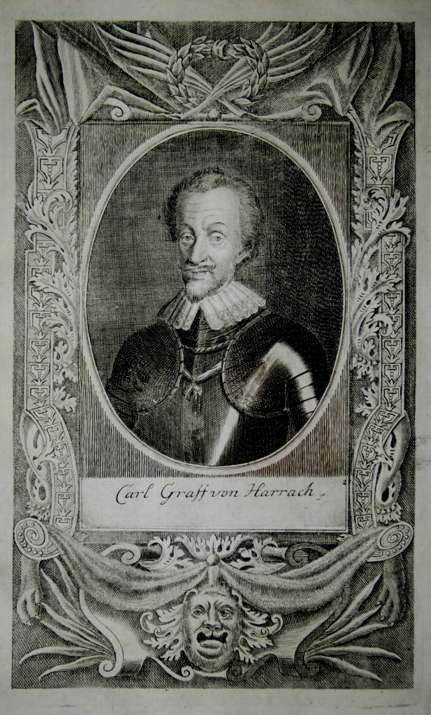 Karl Graf von Harrach (1570 - 1628 Prag): Carl Graff von Harrach. Berater Kaiser Ferdinands II., Ritter des Ordens vom Goldenen Vlies.